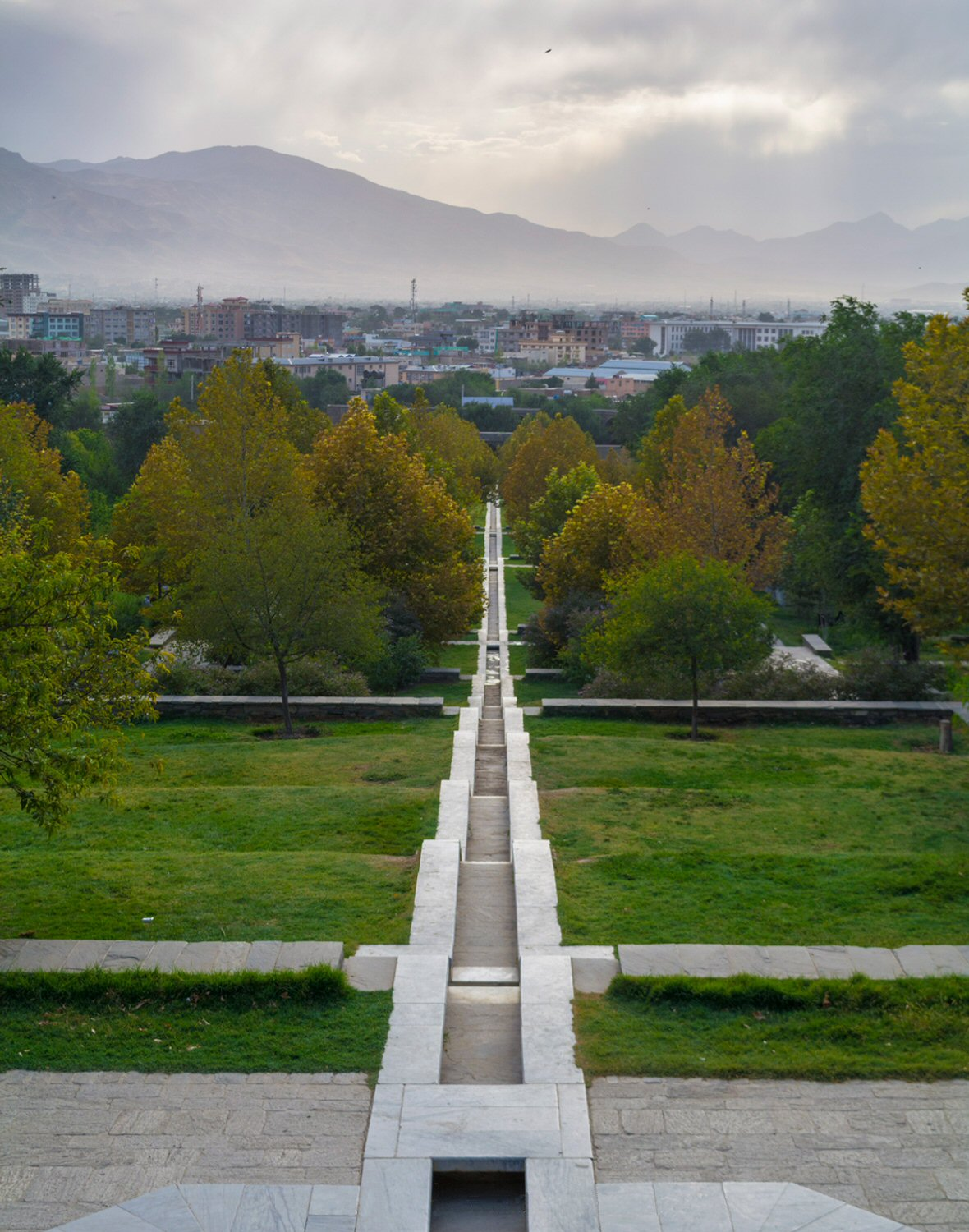 نمایی از باغ بابر در تابستان